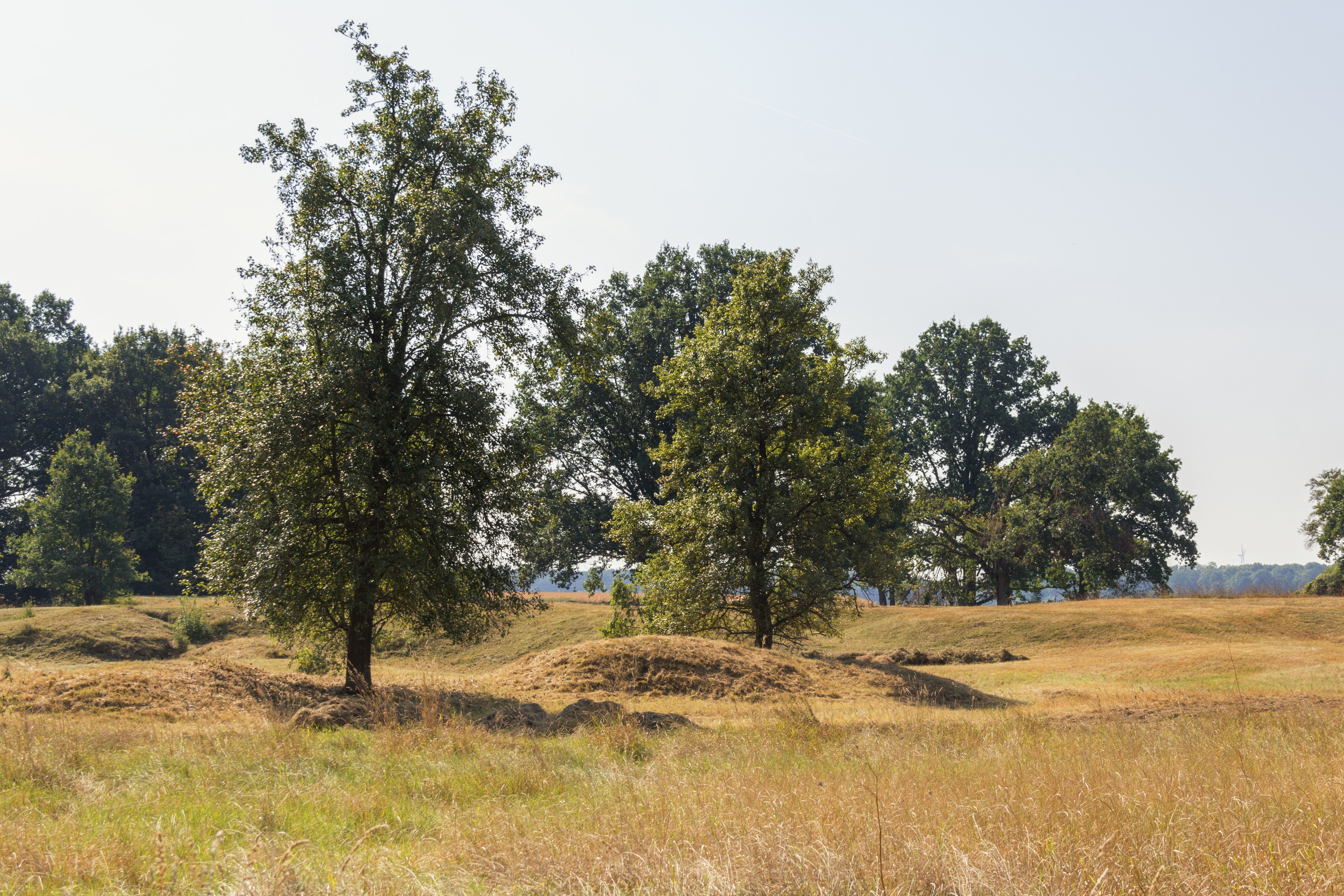 Sulzheimer Gipshügel, Naturschutzgebiet, Geotop, Sulzheim in Unterfranken